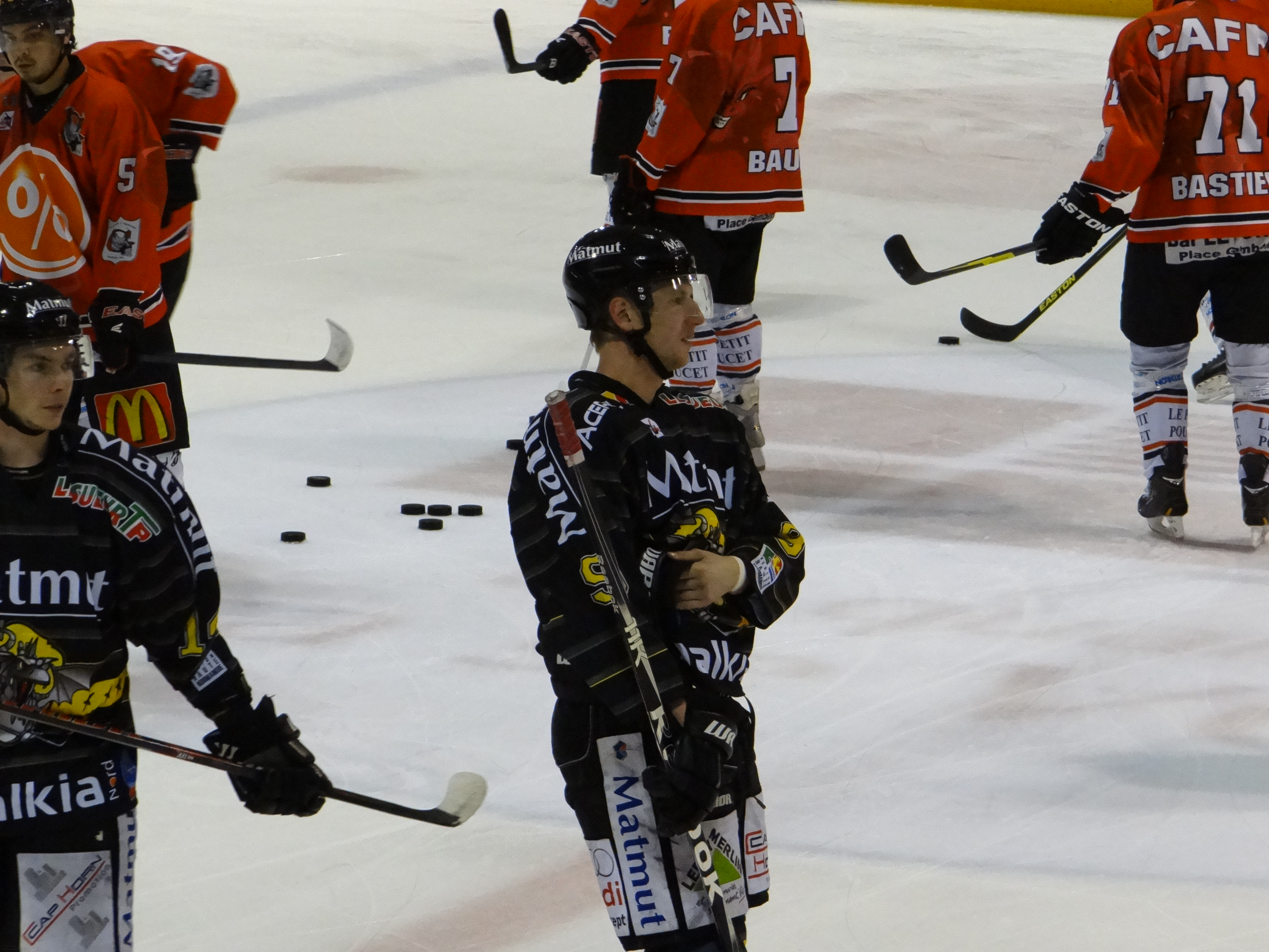 Photo du joueur lors d'un match avec Rouen contre Amien le 22 décembre 2012